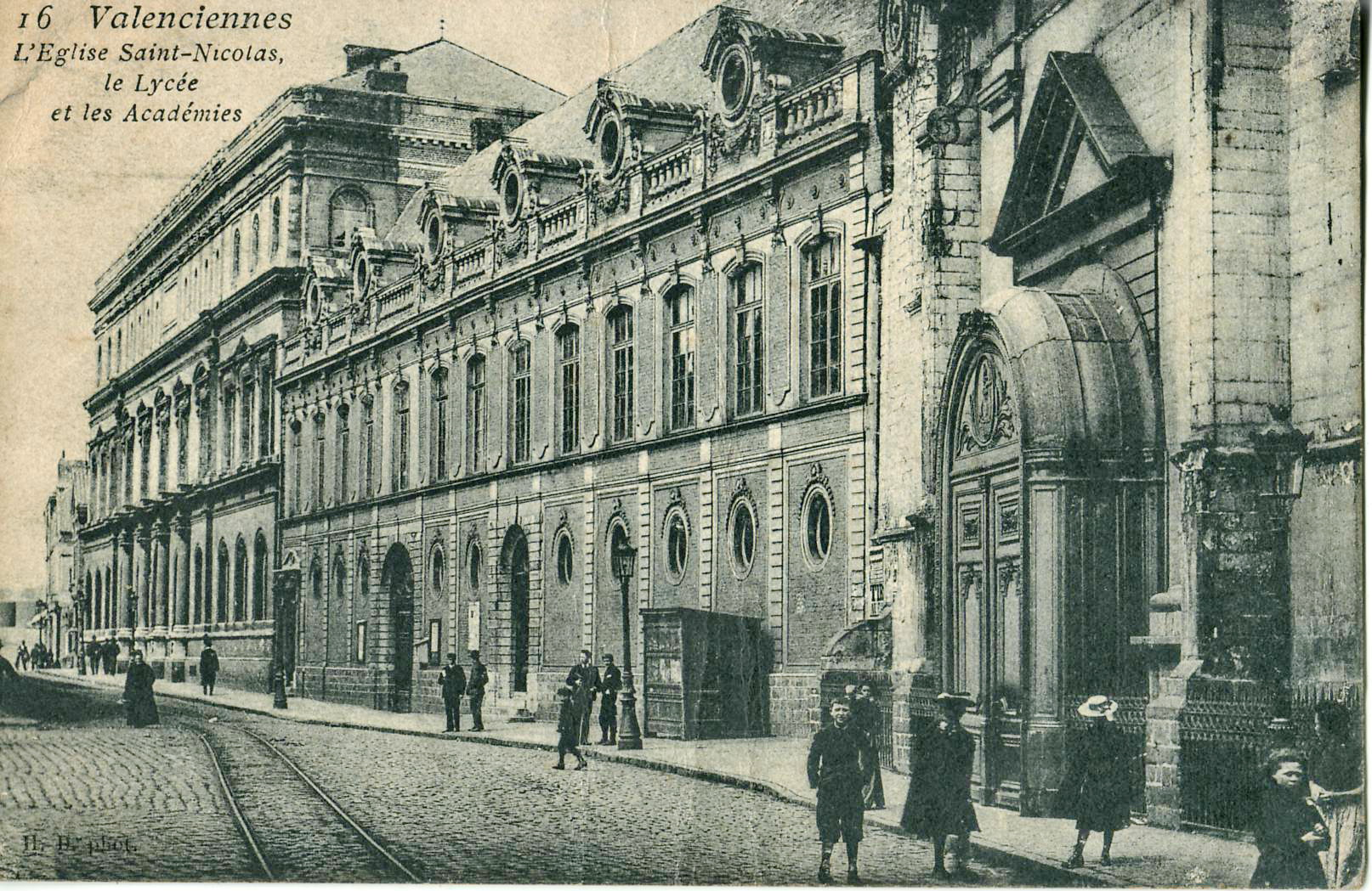 Carte postale ancienne éditée par HD, n°16 : VALENCIENNES - L'Eglise Saint-Nicolas, le Lycée et les Académies. Ancien collège des Jésuites, Rue Ferrand